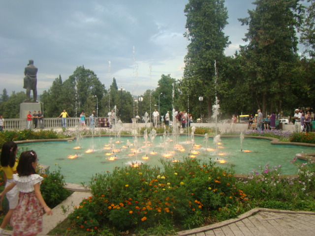 Stepan Shahumyan Square, Stepanakert, Nagorno-Karabakh Republic.